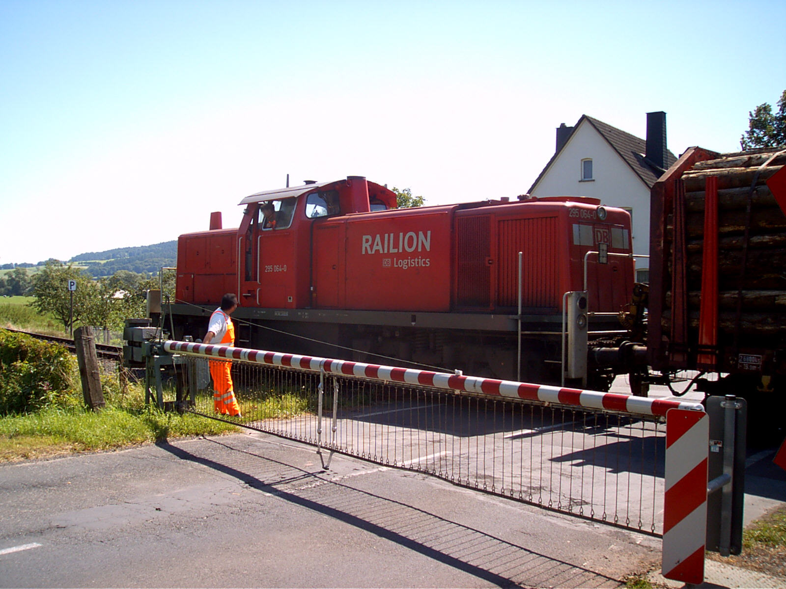 Railion 295 064-0 Güterzug auf dem manuellen Bahnübergang Niederaula